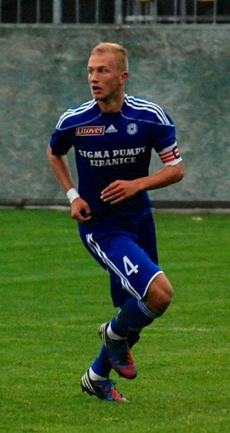 Alex Řehák